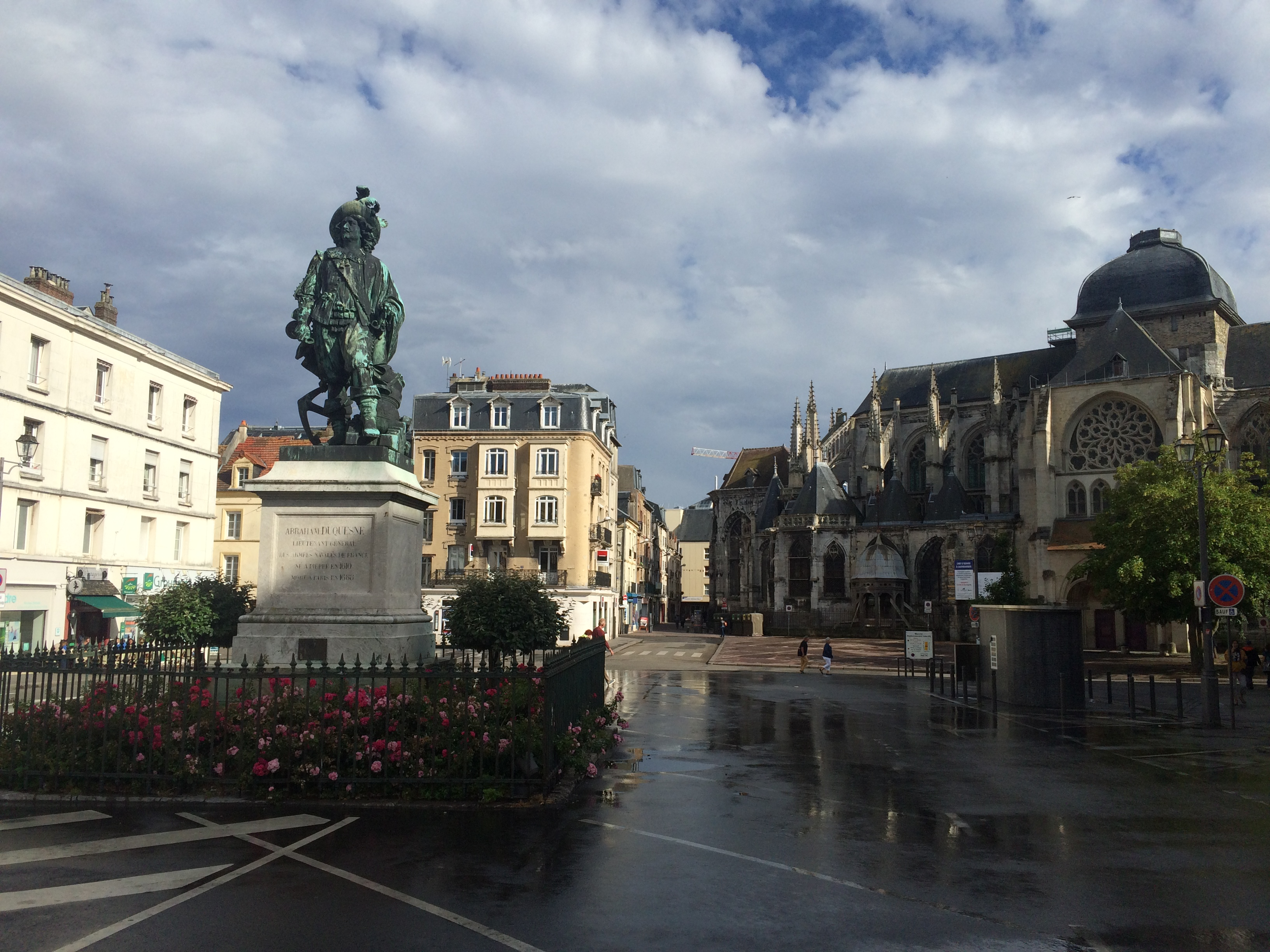 Statue de Dusquene (1844), oeuvre de Dantan, place nationale (ancienne place royale), Dieppe